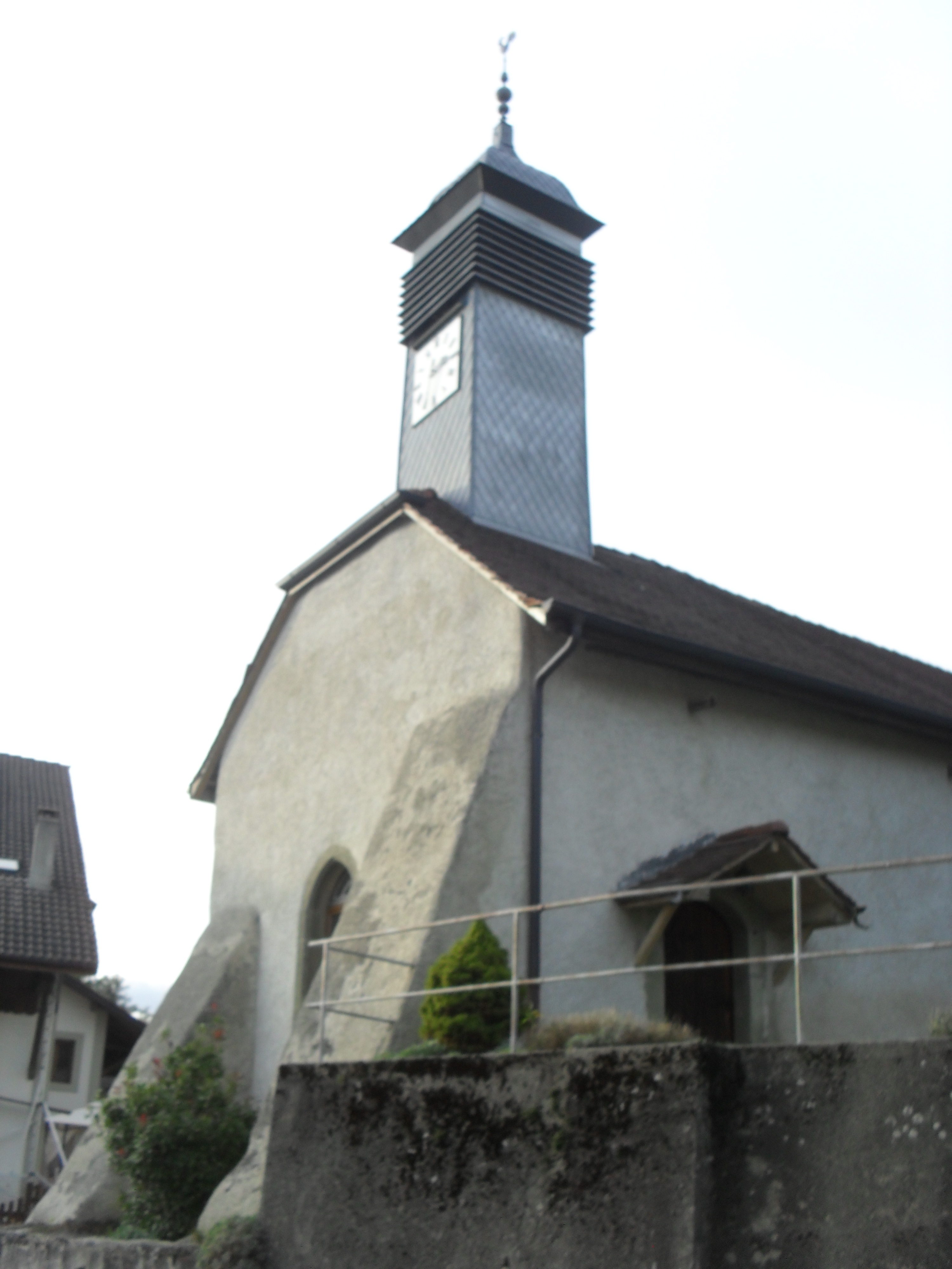 Eglise de Chavannes-sur-Moudon